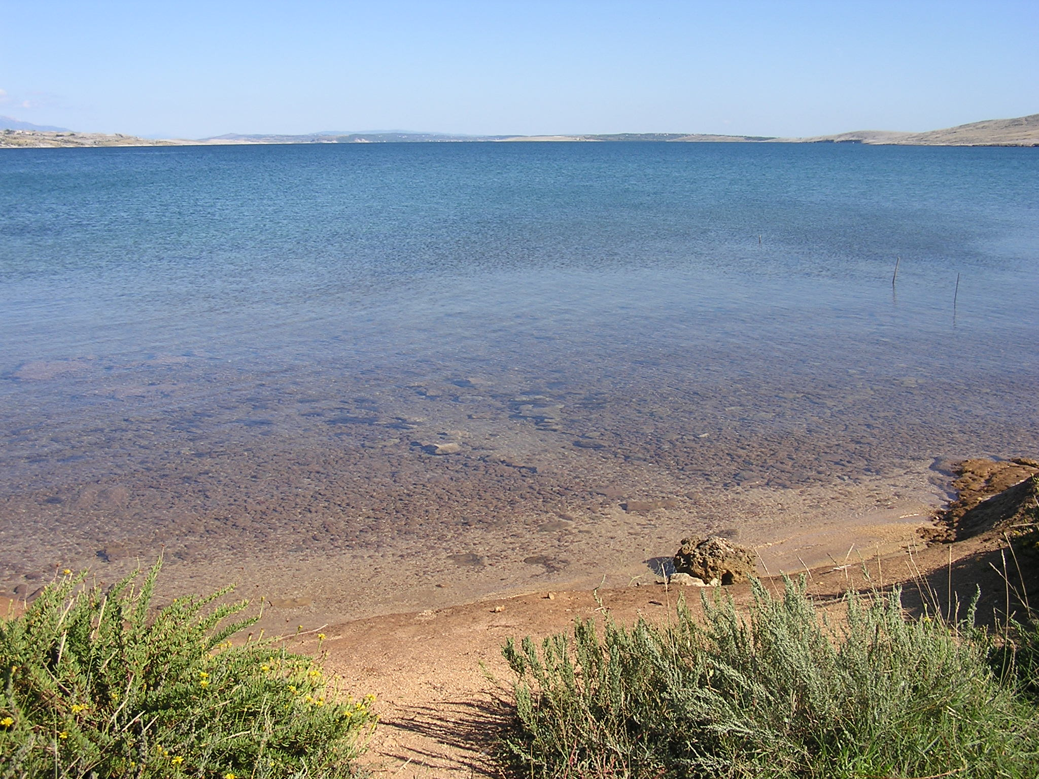 Island Pag